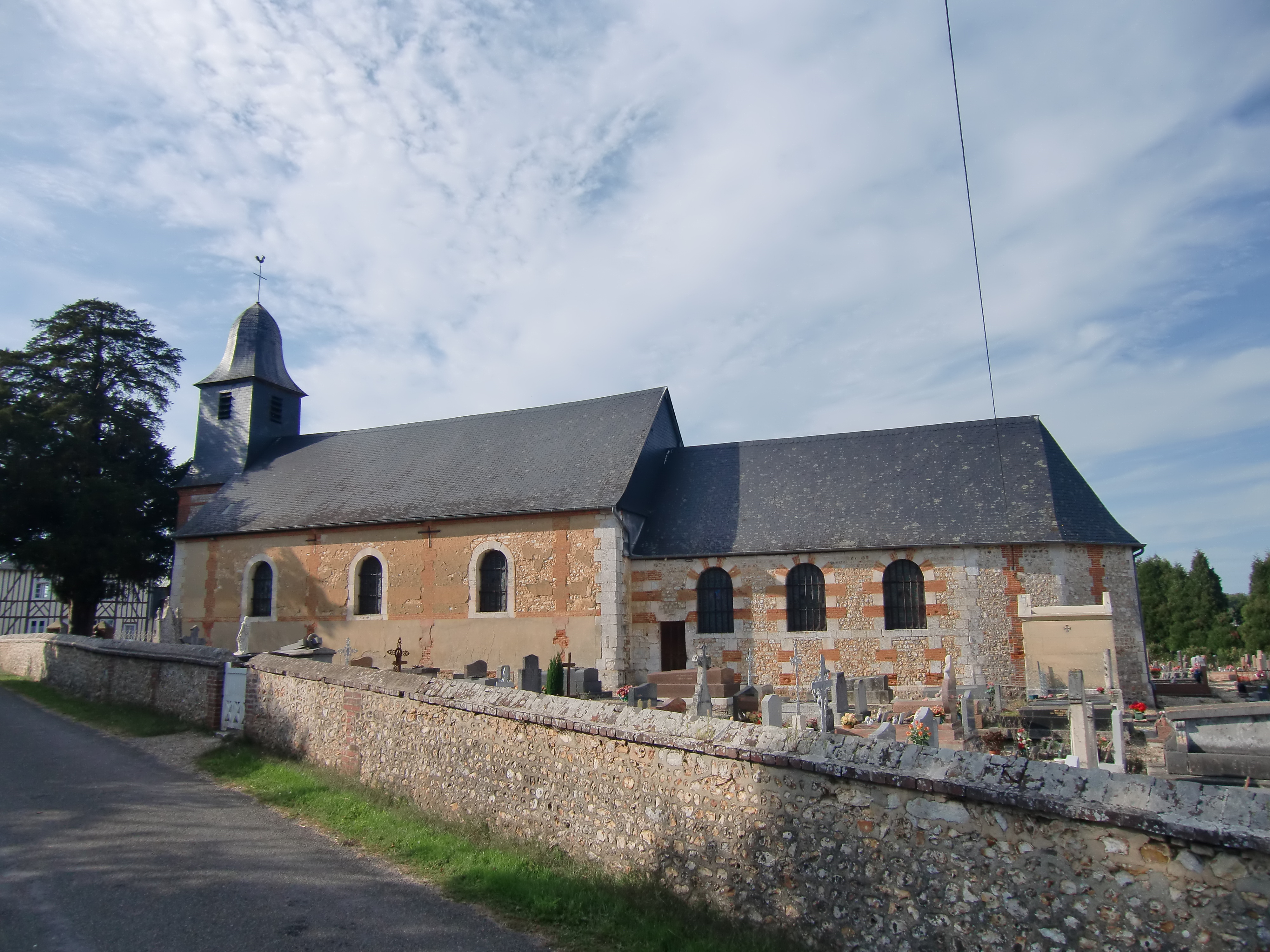 église de Manneville-sur-Risle (Eure, Normandie, France)